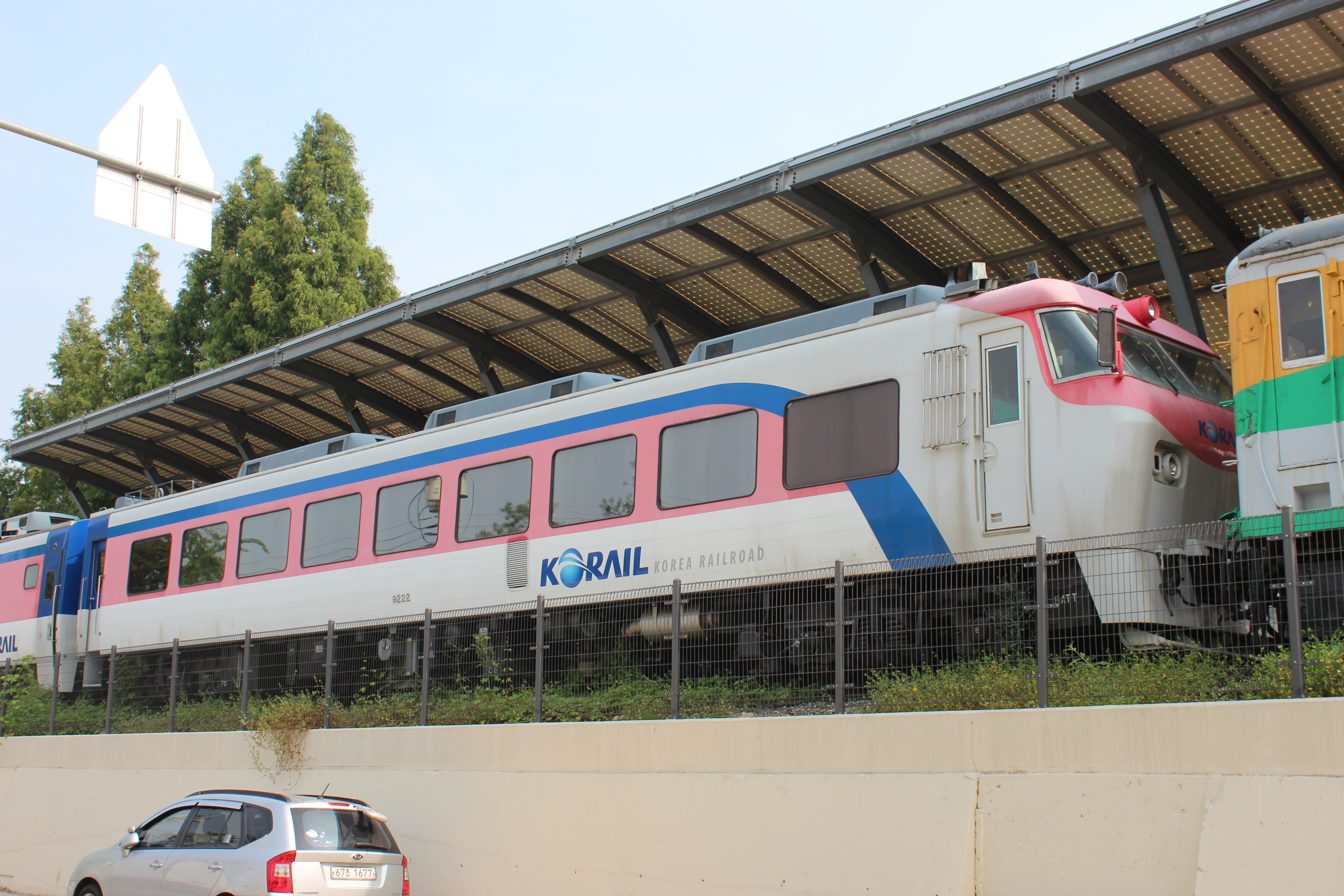 大韓民国京畿道義王市にある鉄道博物館に保存されている韓国鉄道9211系（NDC） 9222号